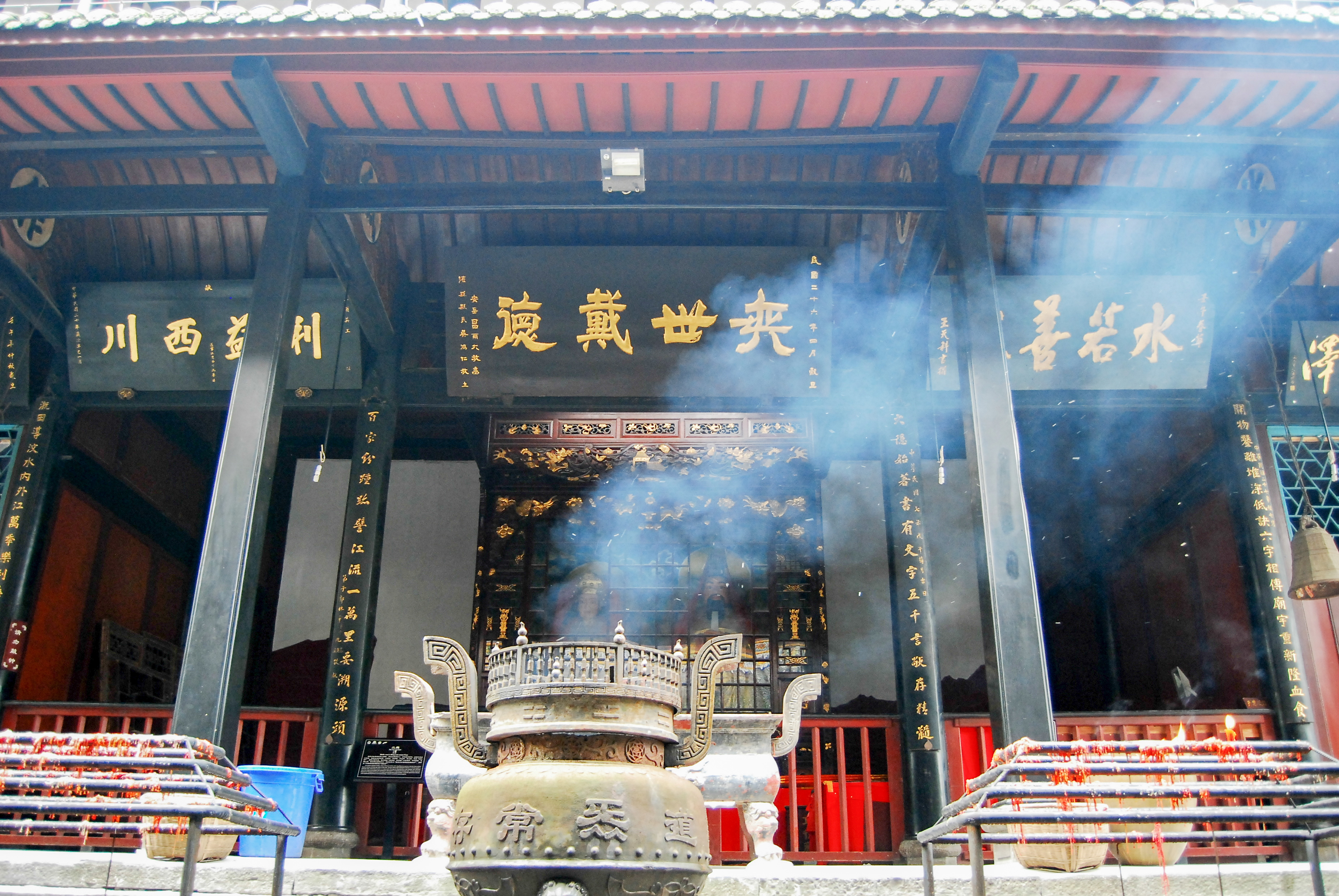 中文（中国大陆）: 都江堰二王庙内殿